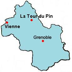 Département de l'Isère (38)